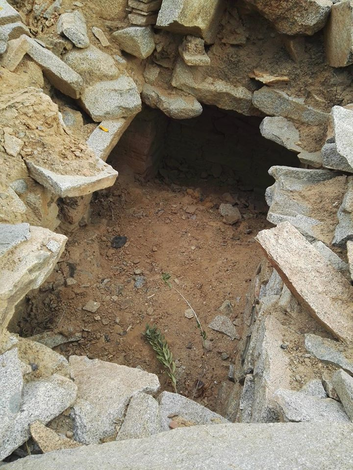 Entrada a una parte del sitio arqueológico de Kajur en Pampas Grande